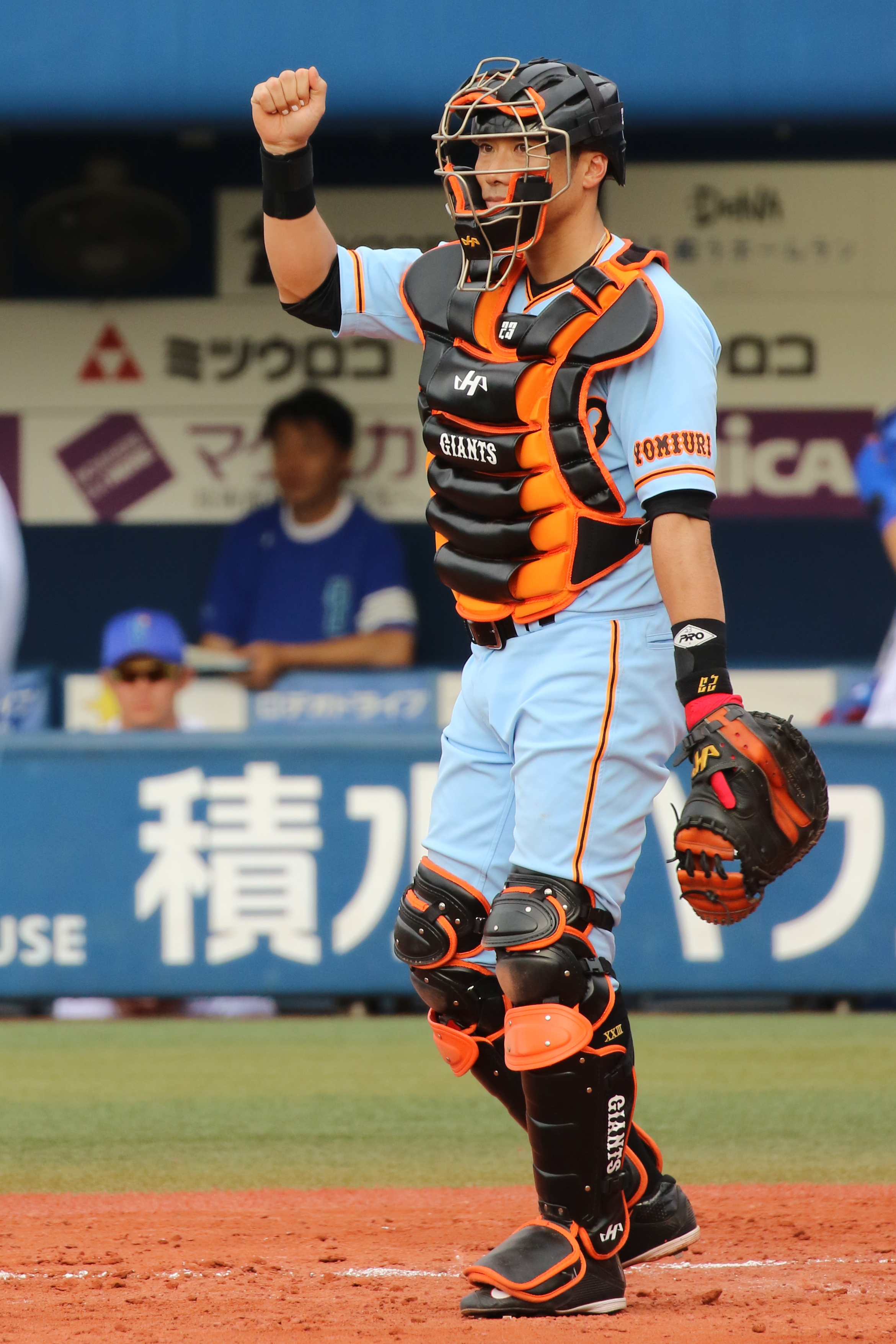 ジャイアンツ相川選手